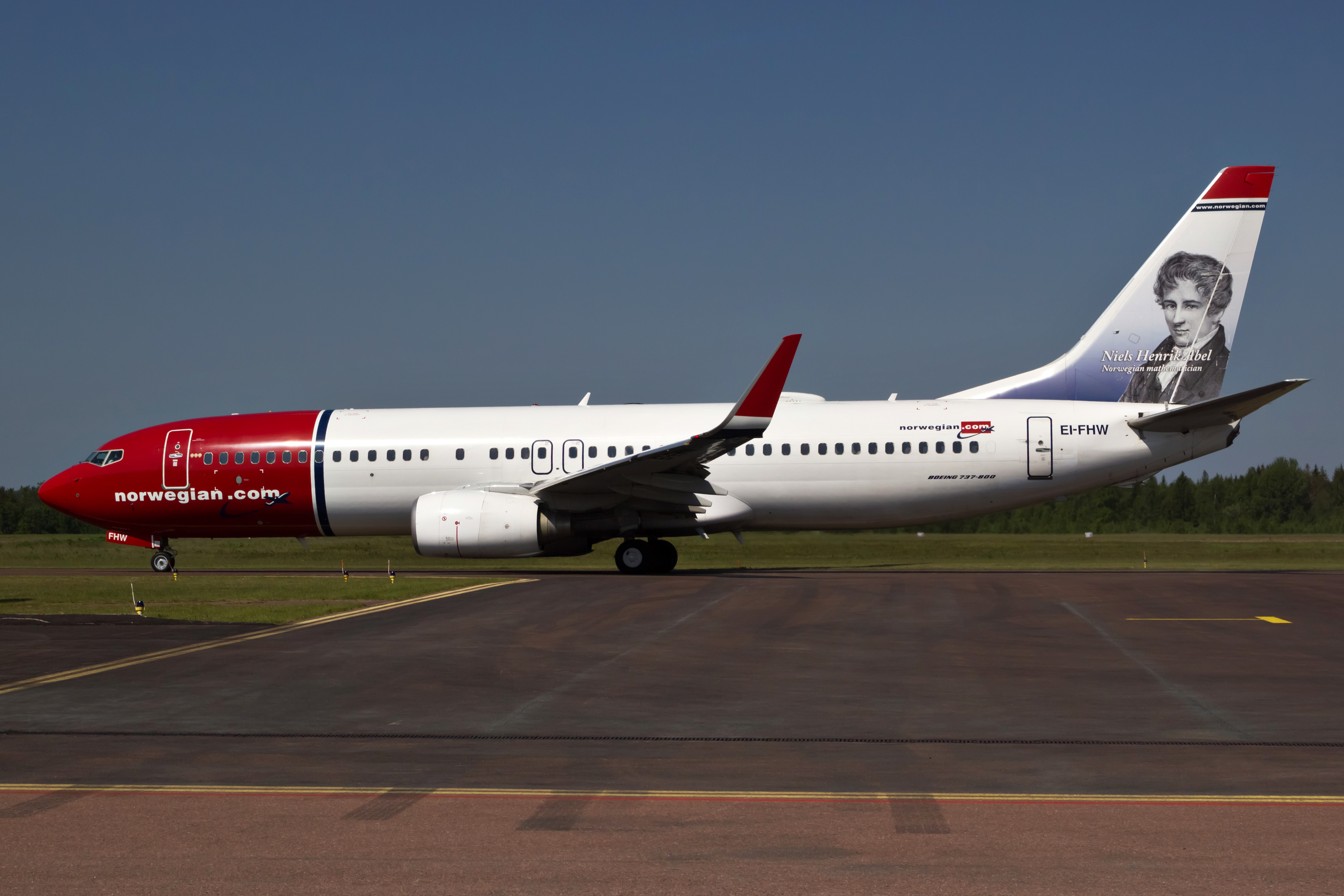 Boeing 737 de Norwegian no aeroporto de Karlstad.